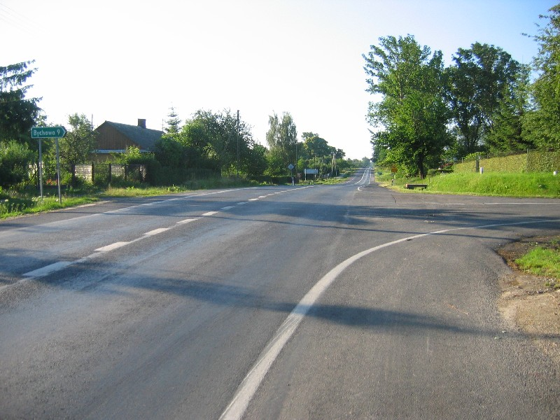 Skrzyżowanie w Piotrkowie